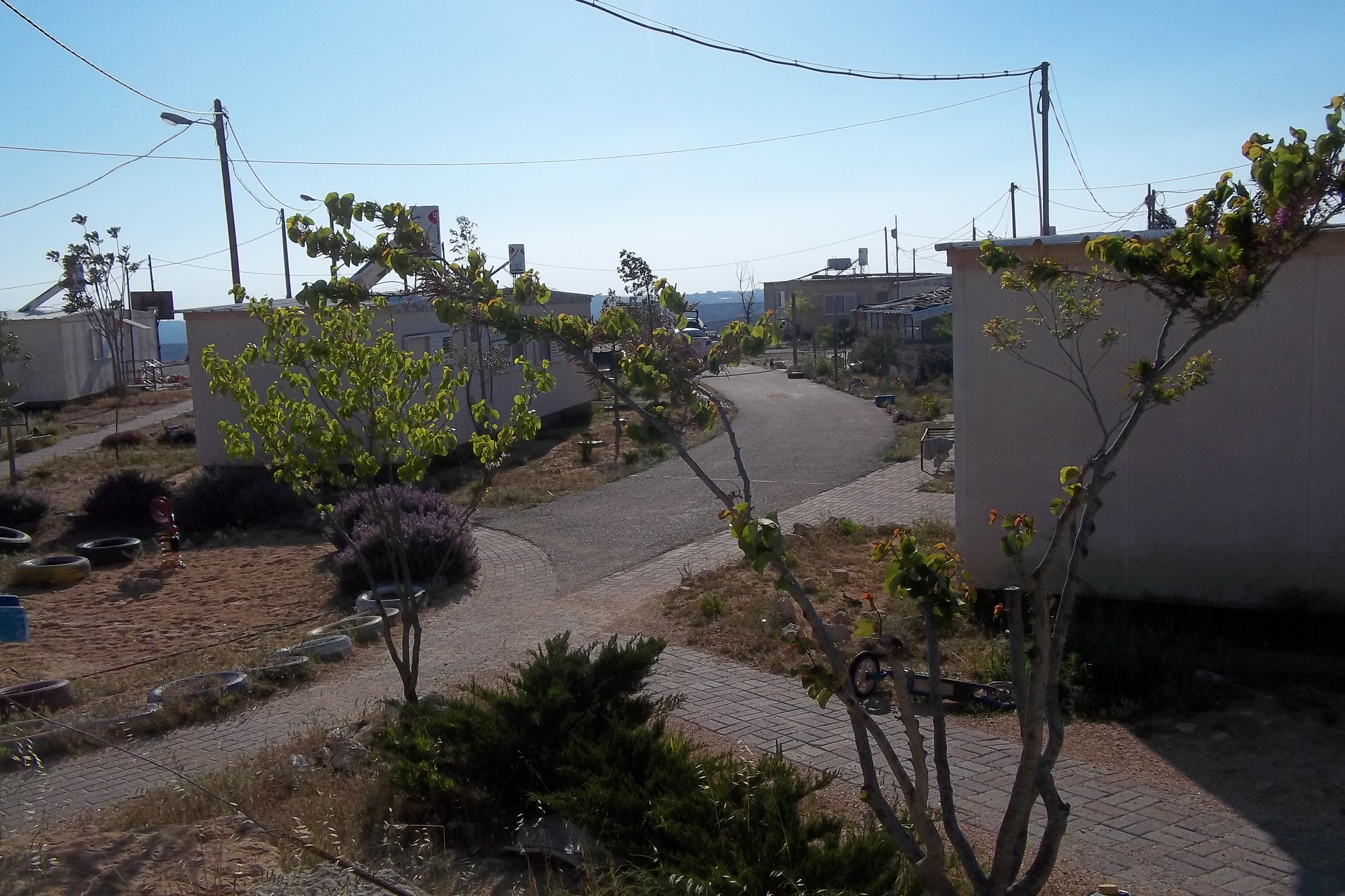 מצפה אשתמוע דרום הרי חברון